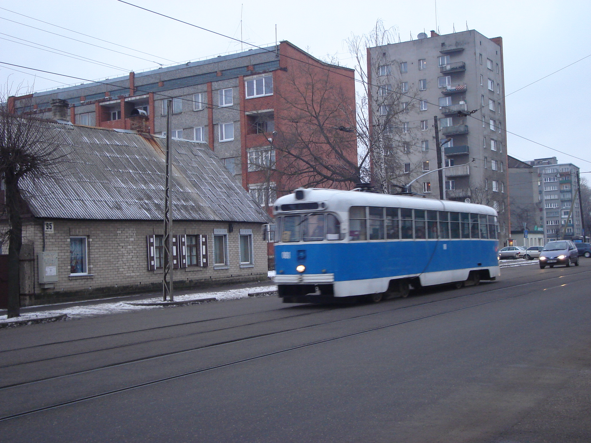 трамвай на Смилшу